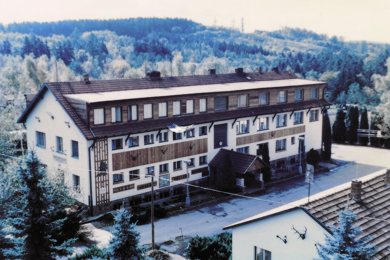 Budova lesnické školy na Křivoklátě v 80. letech